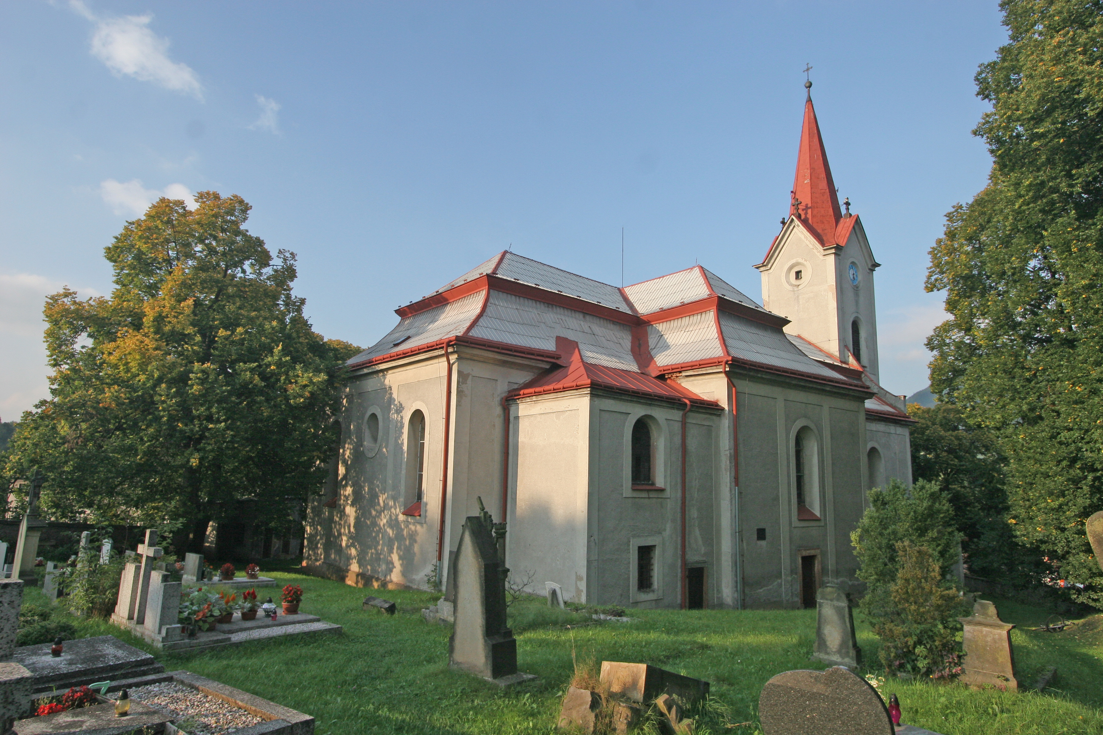 Kostel Nanebevzetí Panny Marie (Bernartice), Bernartice, Bernartice (okres Trutnov).